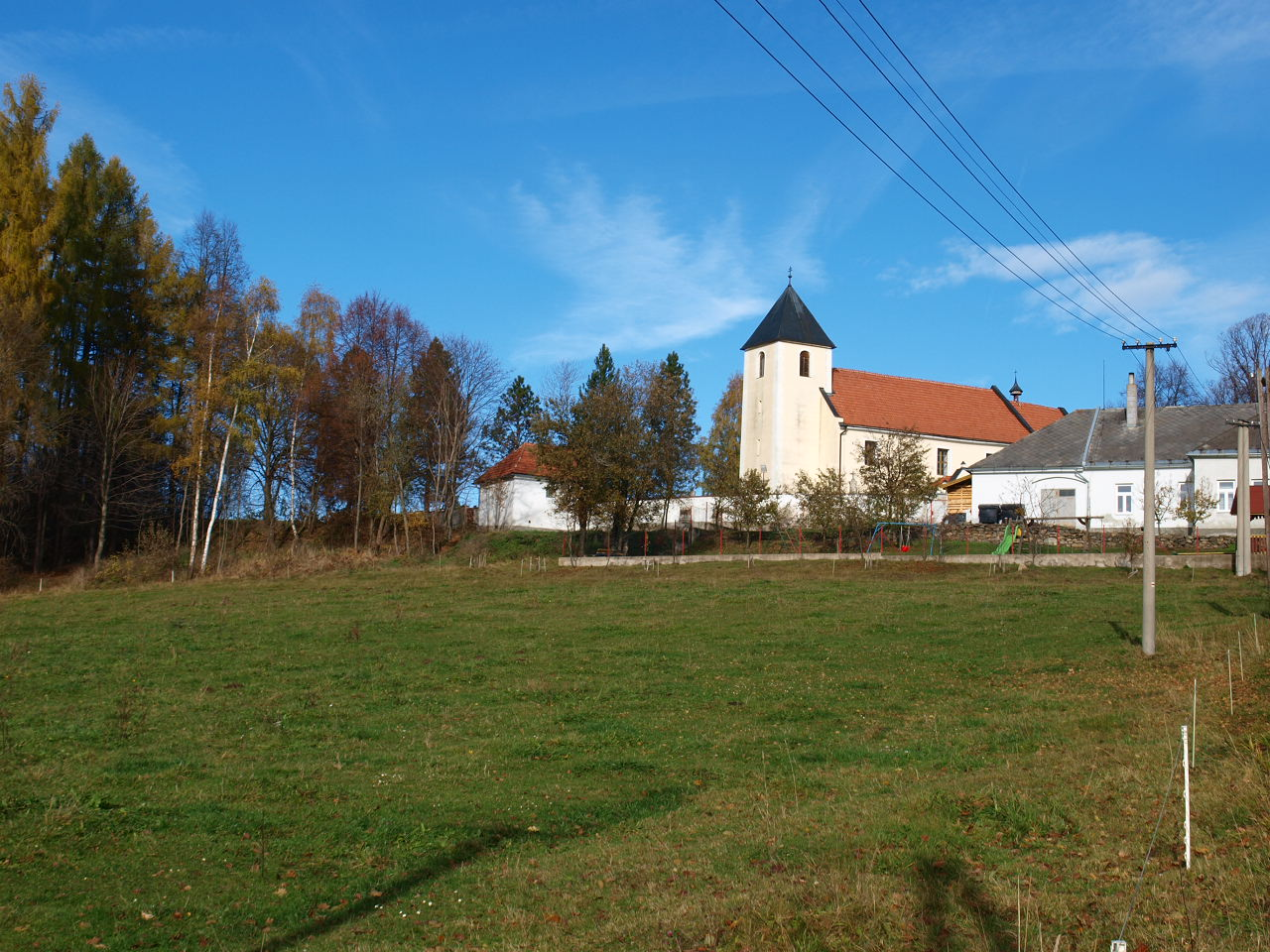 Vimpersko, kostel sv. Maří Magdalény